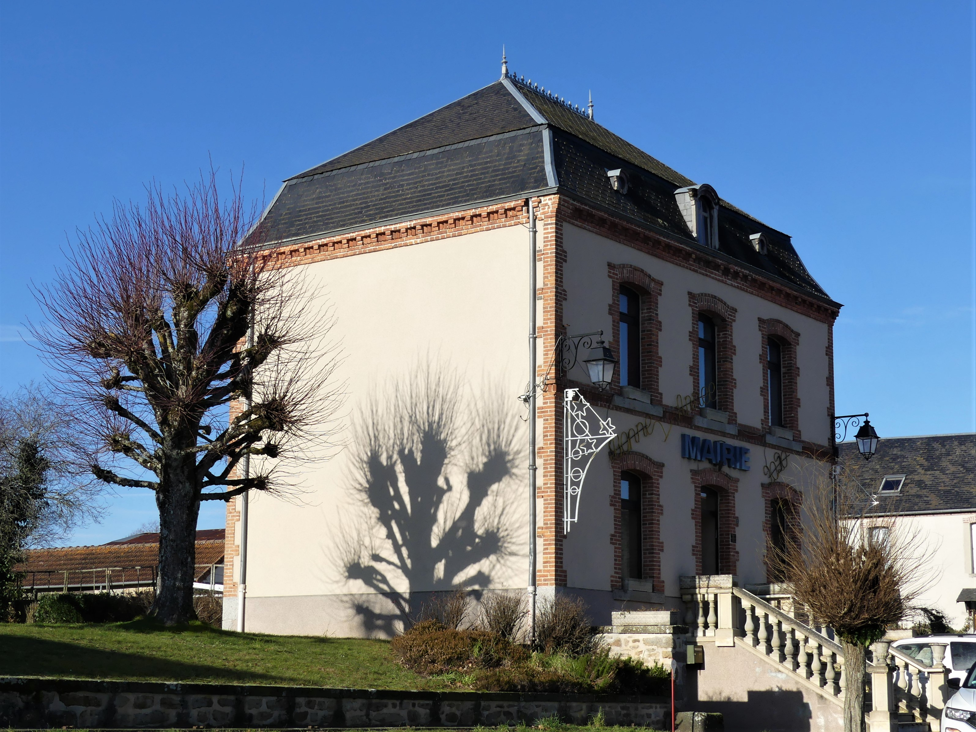 La mairie de Cressat, Creuse, France.